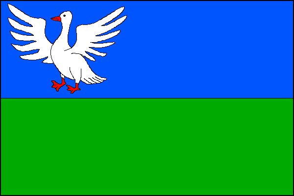 vlajka, Rokytnice, okres Přerov